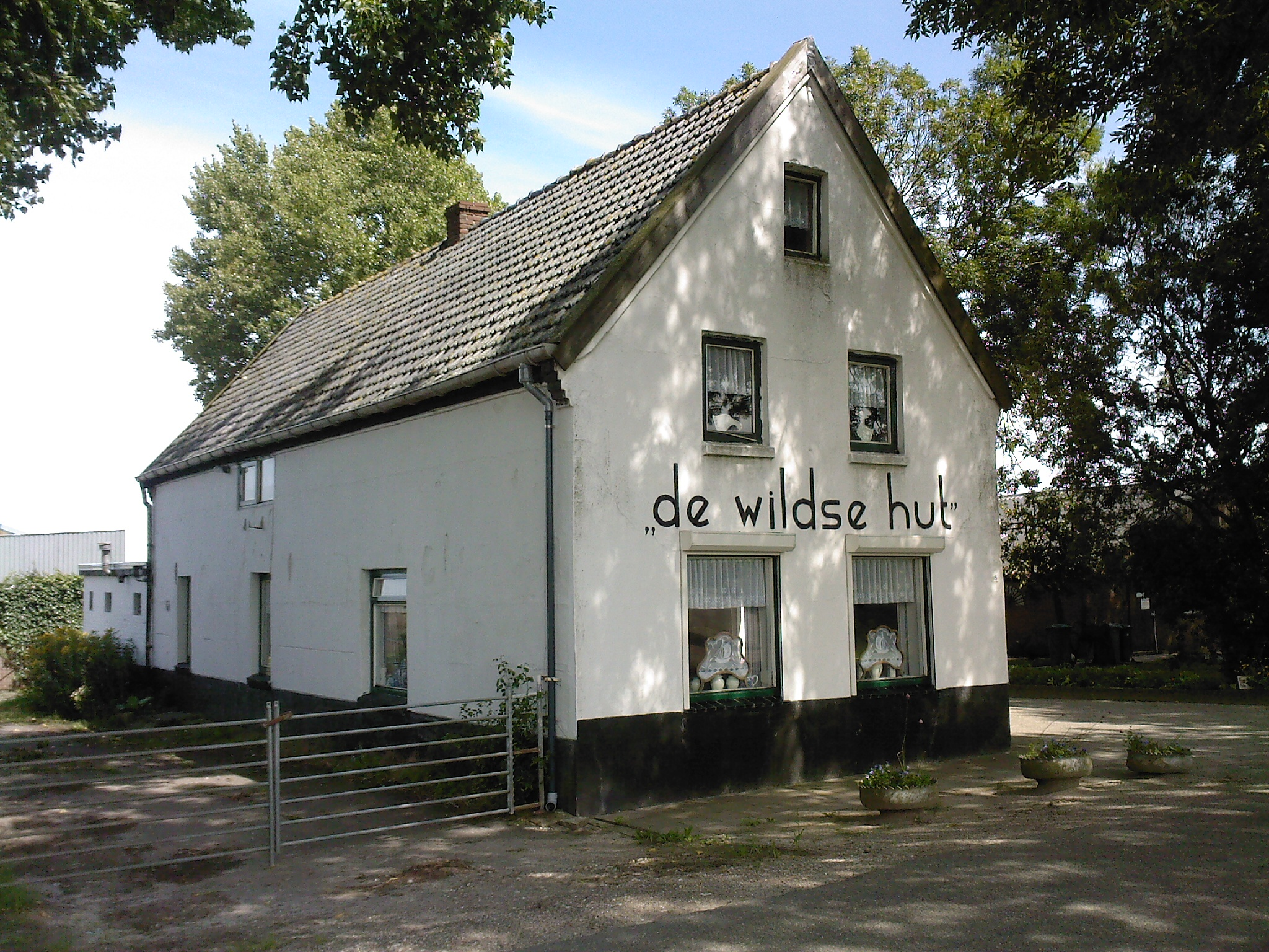 Oude cafe de Wildse Hut